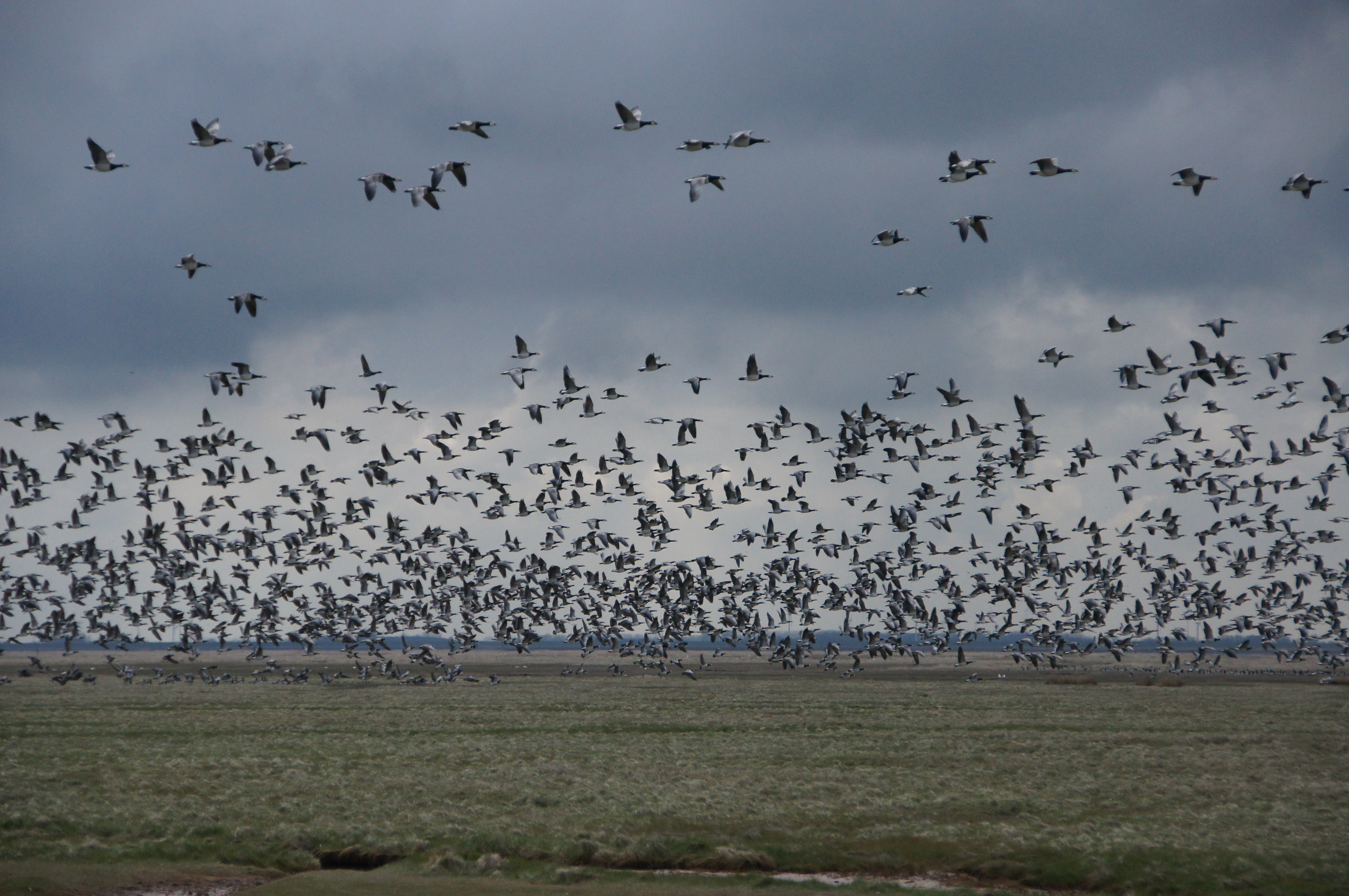 Fliegende Weißwangengänse (Branta leucopsis) auf Norderney; Bereich im Nationalpark Niedersächsisches Wattenmeer. Im Wattenmeer überwintern viele Vögel aus arktischen Gebieten.